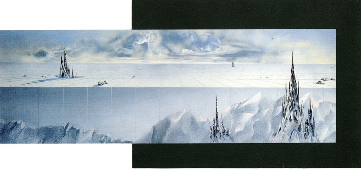 Орловский В. Ф. «Пейзаж для созерцания», 1986 г. Оргалит, темпера, 50х148см.